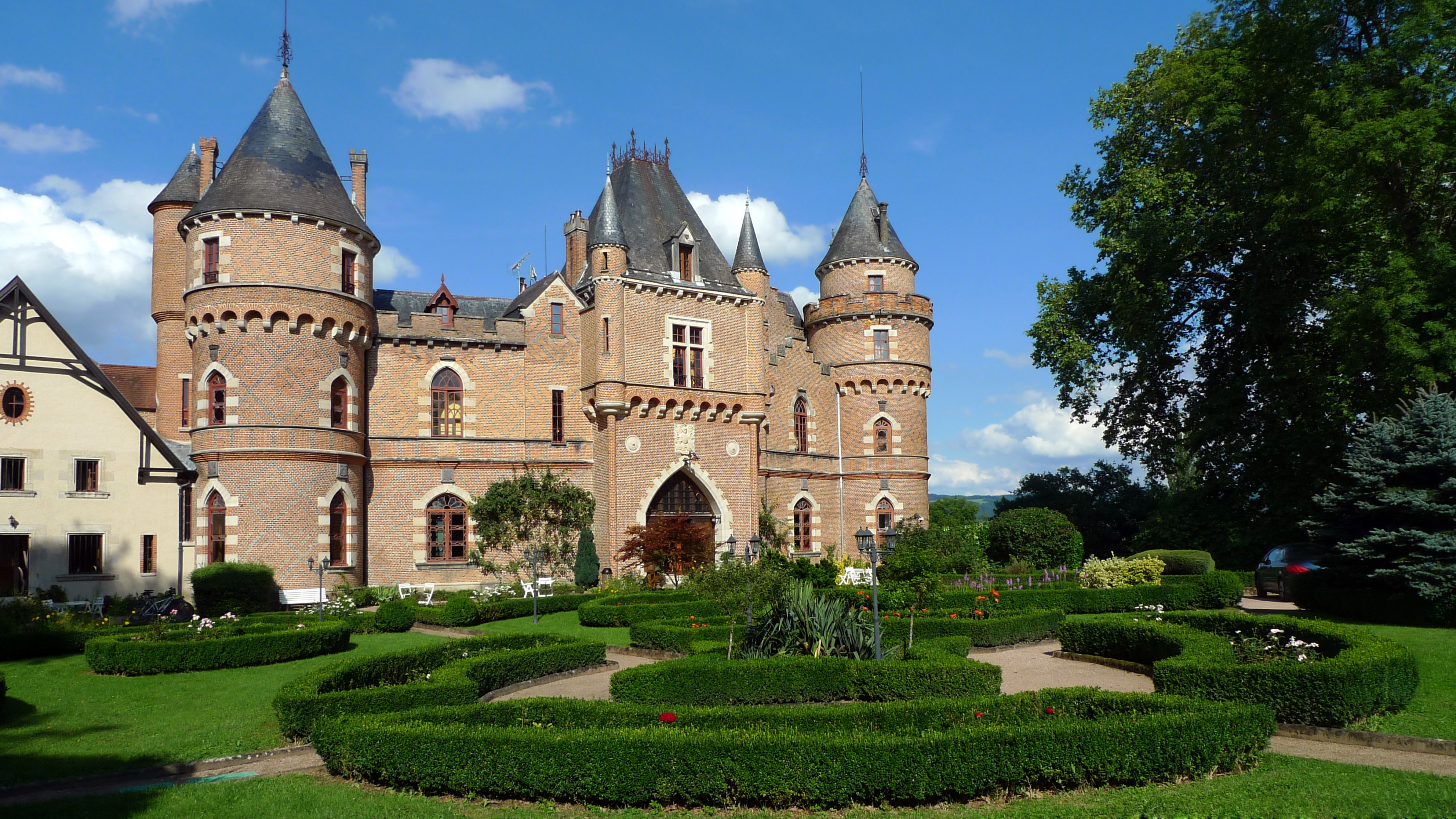 Le château de Maulmont à Saint-Priest-Bramefant, Puy-de-Dôme